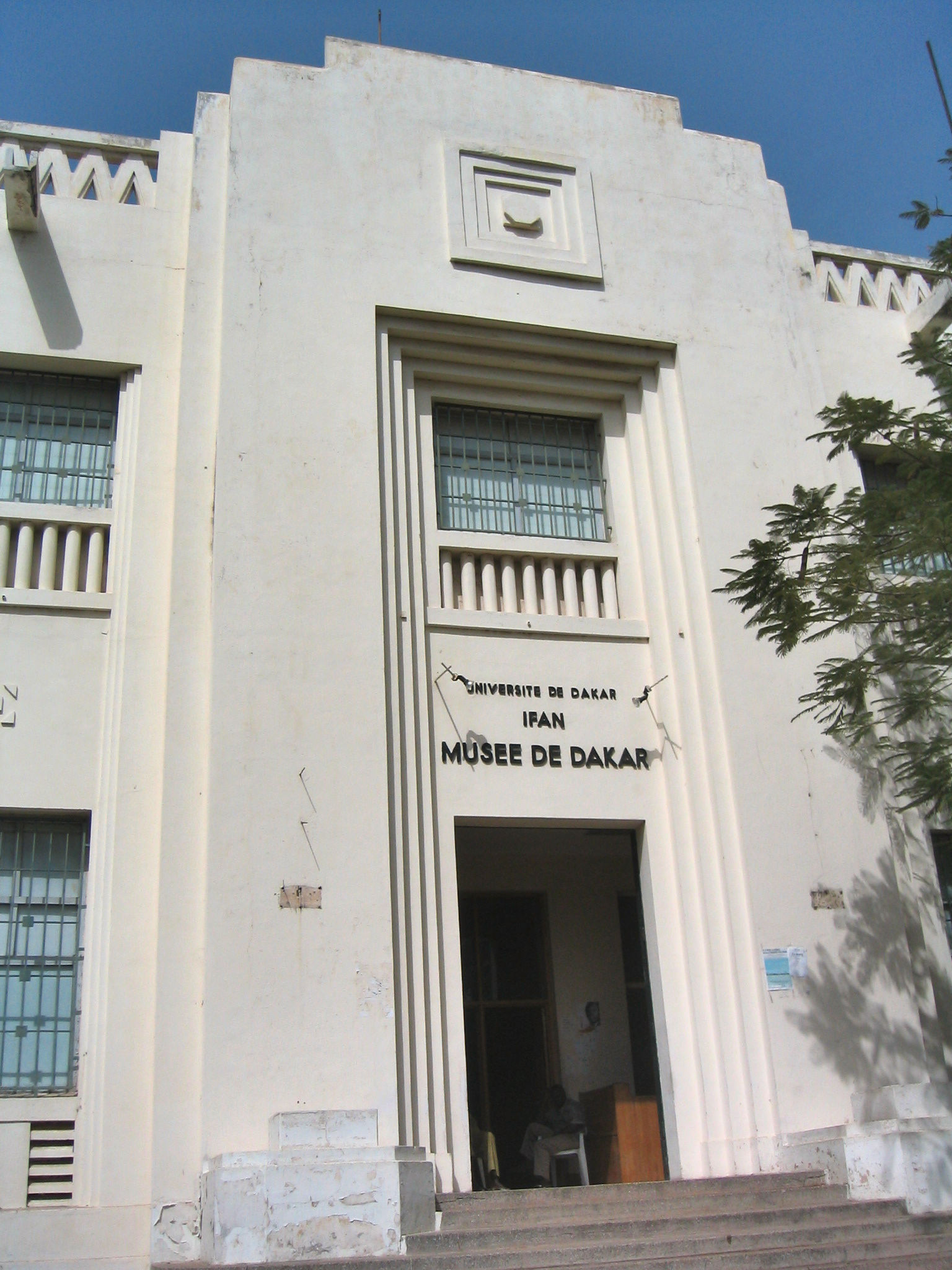 Musée d'art africain de Dakar composante de l'IFAN (Institut Fondamental d'Afrique Noire, Université Cheikh Anta Diop)